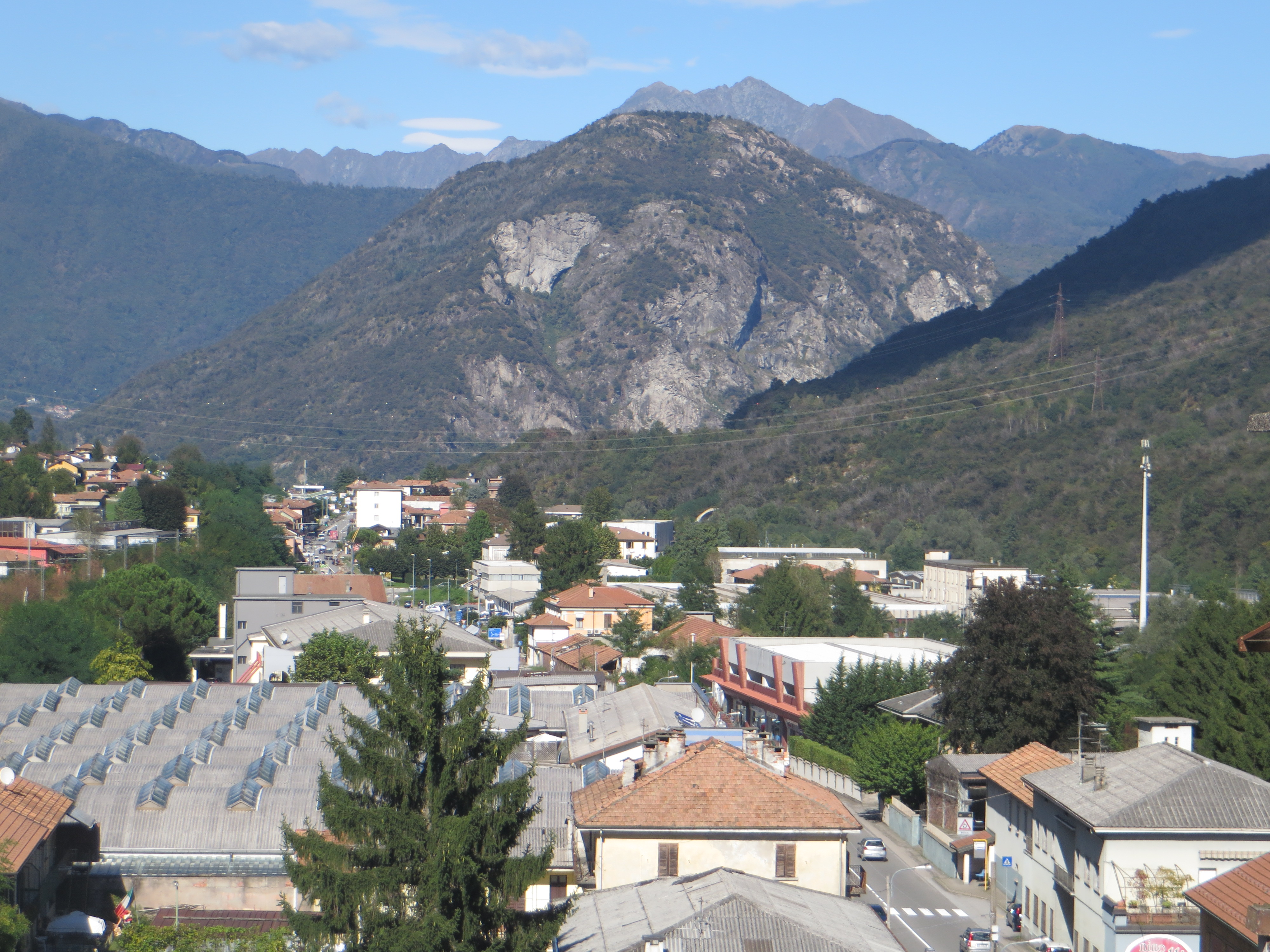 Frazione Sant'Anna di Casale Corte Cerro